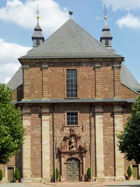 Basiliek St. Georg,Walldürn Fotograaf: WikiWannes